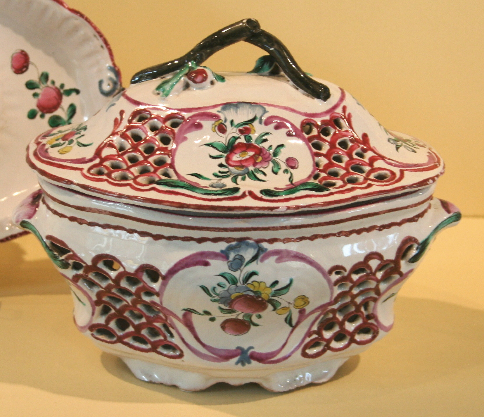 Musée de la faïence à Marseille, sucrier de la fabrique Ferrat à Moustiers, hauteur=15cm longueur=23cm.